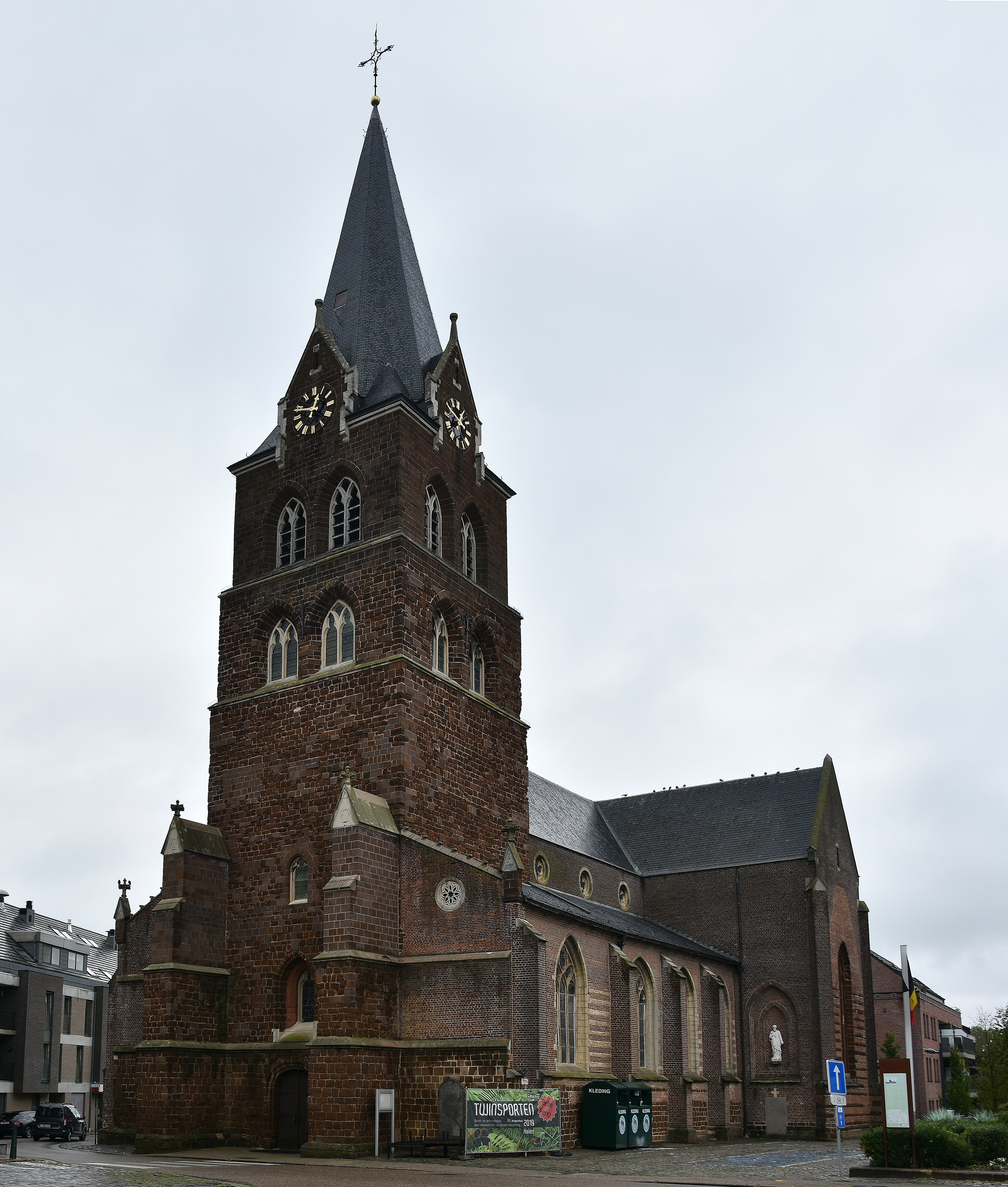 Sint-Pietersbandenkerk (Halen) (21764) 18-08-2019 This photo of immovable heritage has been taken in the Flemish Region